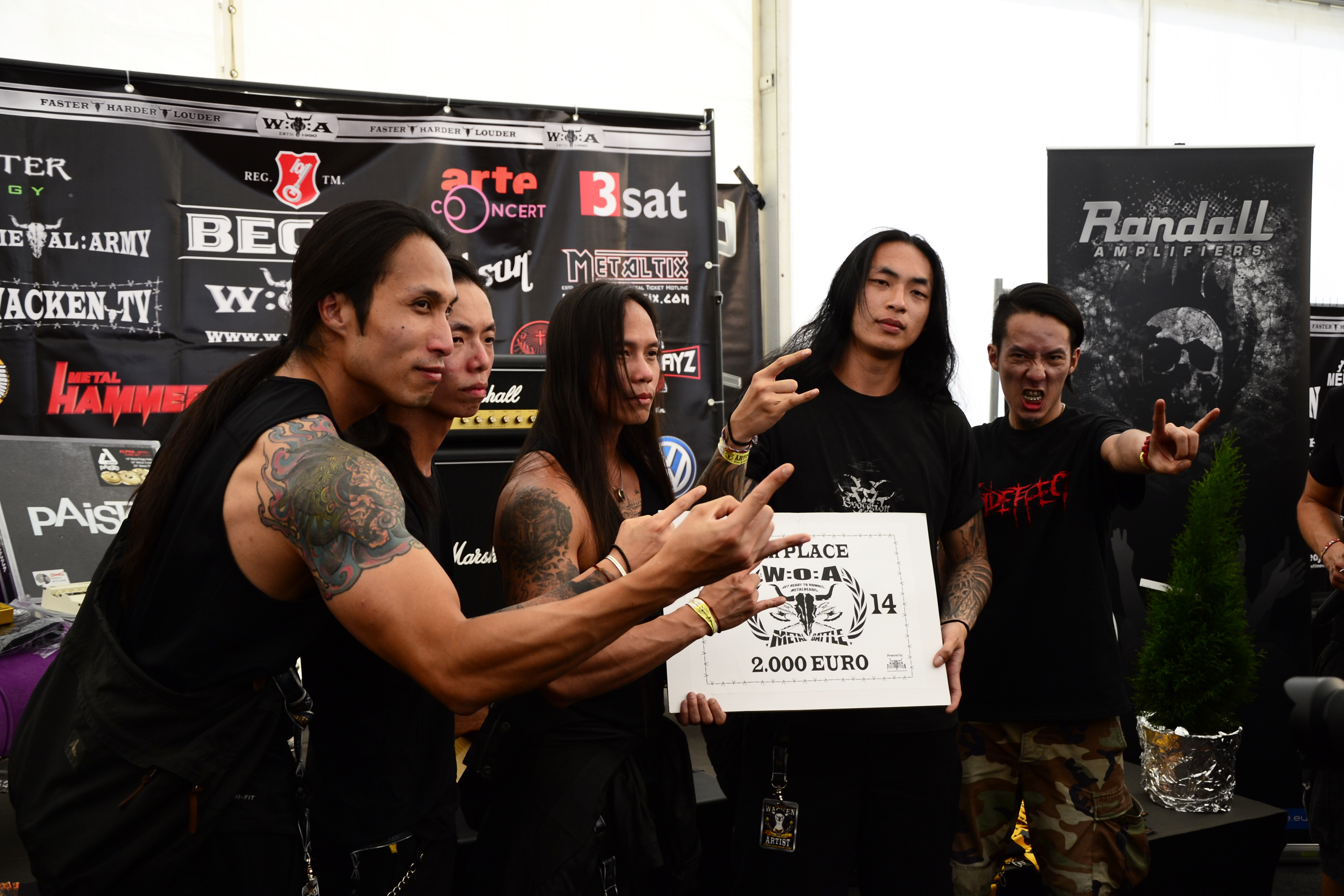 Die Gewinner des 4. Platzes beim Metal Battle 2014 Evocation aus China bei der Preisverleiung beim Wacken Open Air 2014